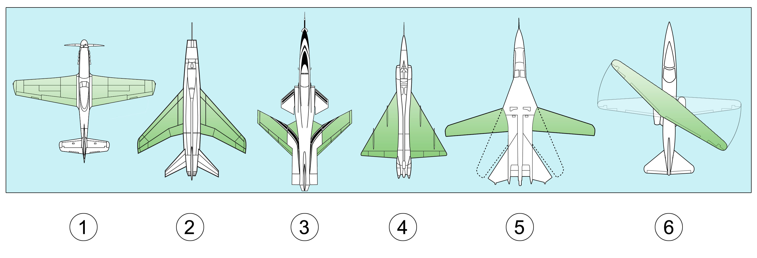 Configurazione delle ali